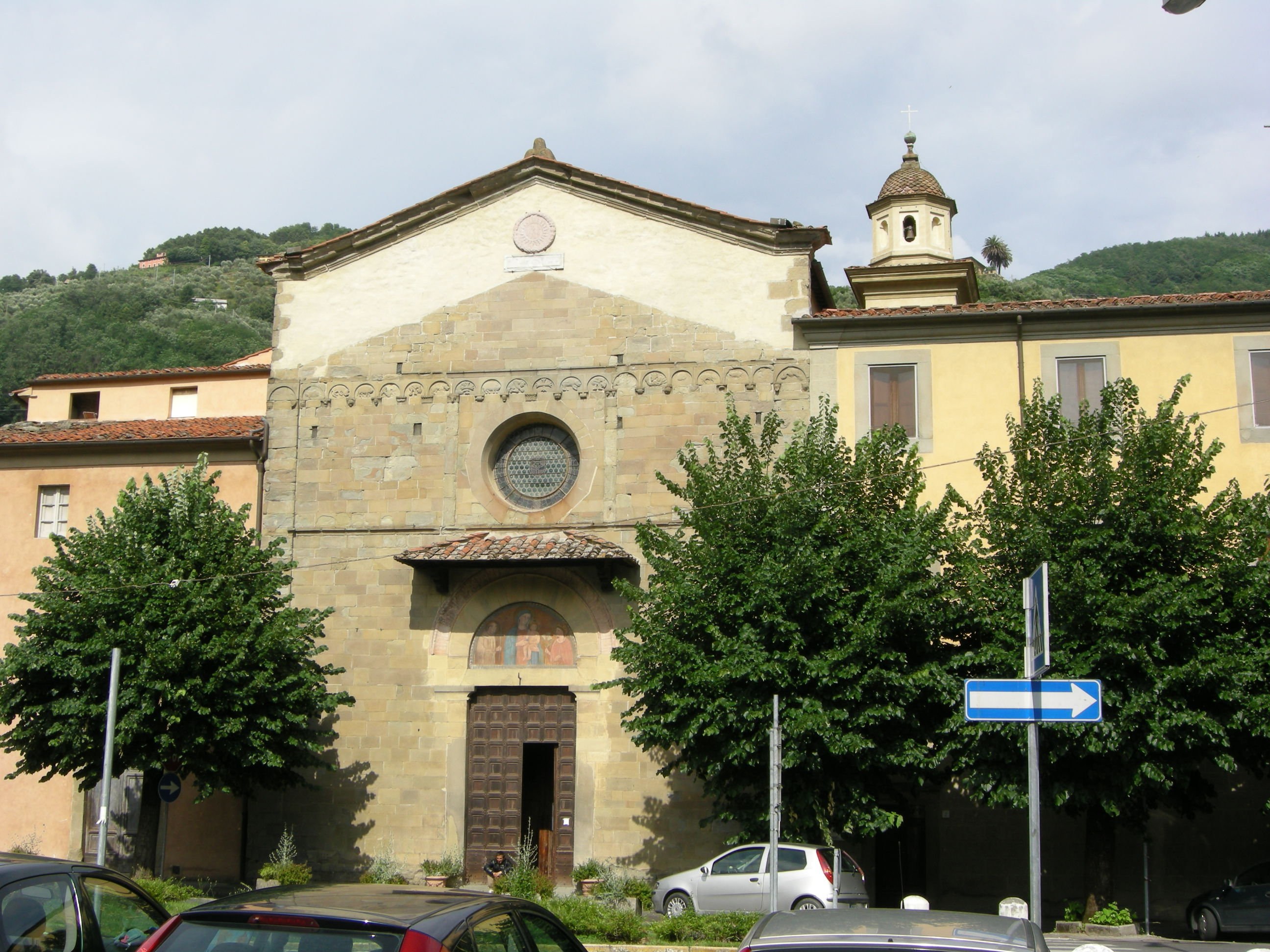 Pescia, san francesco